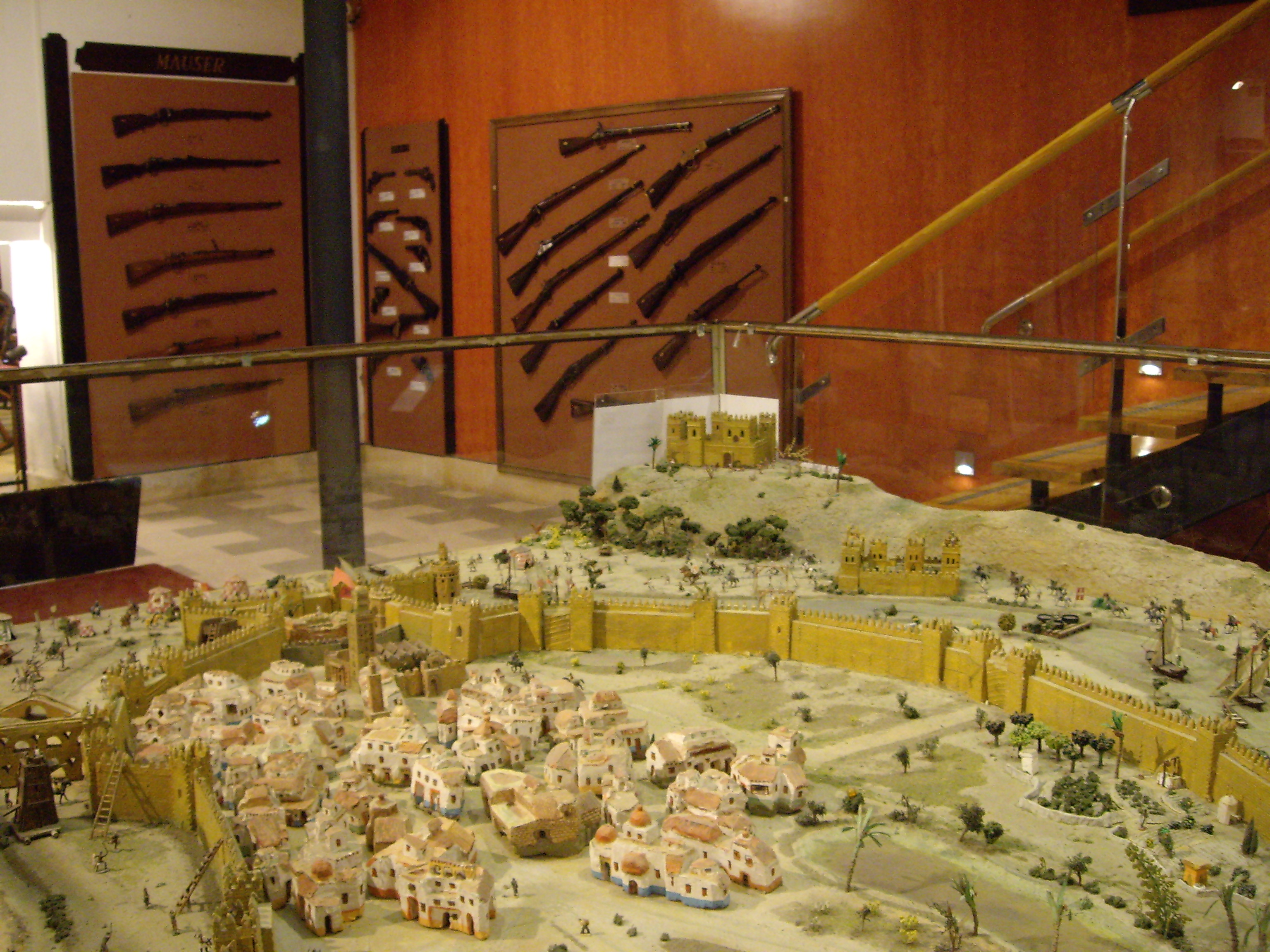 Maqueta de la Reconquista de Sevilla en el Museo Histórico Militar de Sevilla.